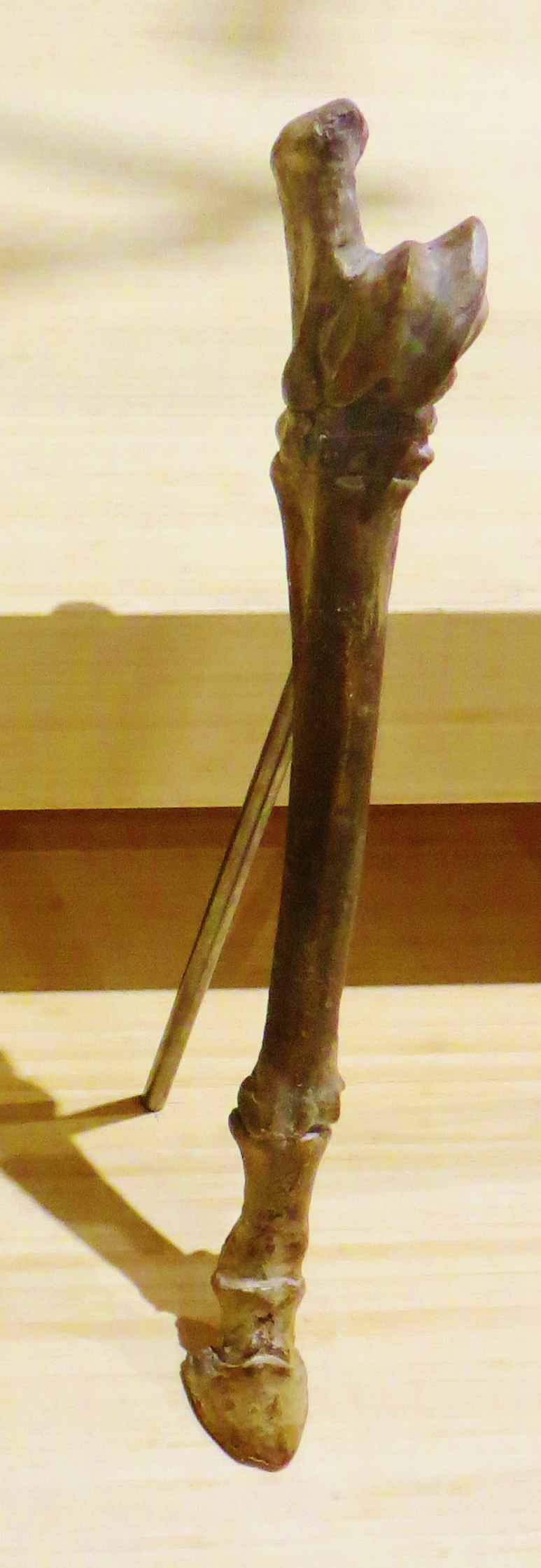 Fossil of Dinohippus, an extinct mammal- Took the picture at Muse (Trento)